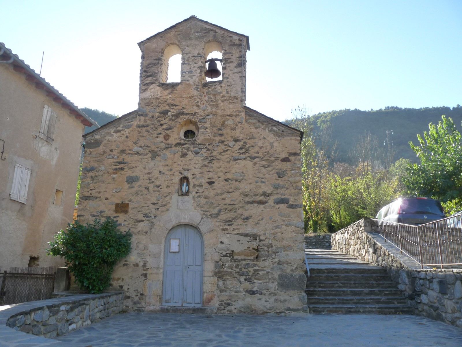 Chapelle de Joncet, Joncet-del-Bac, Serdinya, Pyrénées-Orientales, France